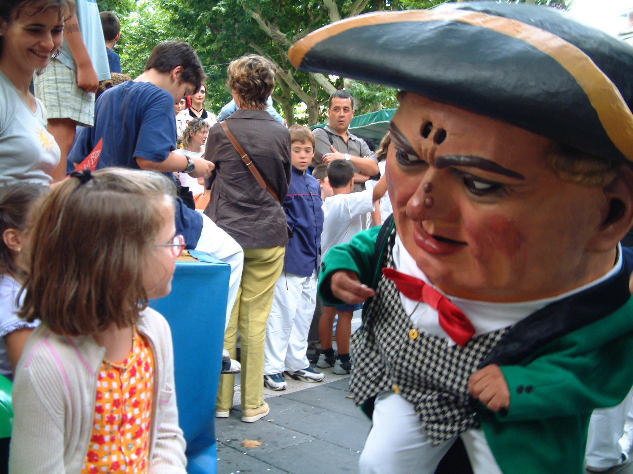 Nan a Manresa.